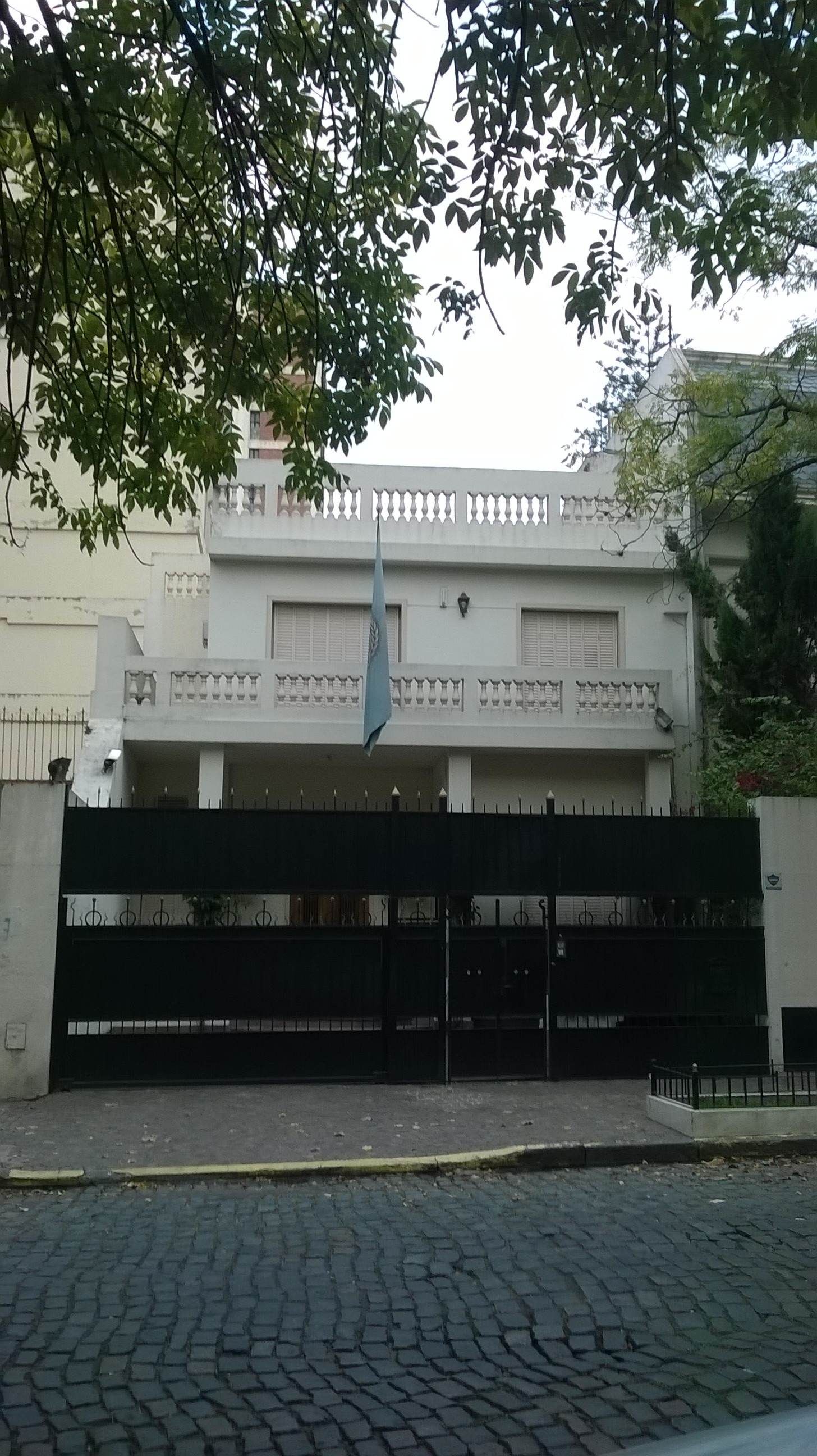 Embajada de la Liga Arabe en la Ciudad Autonoma de Buenos Aires, Belgrano R.